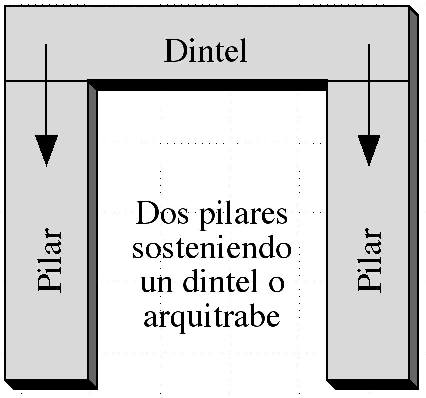 Esquema de un arquitrabe sencillo con sus elementos funamentales